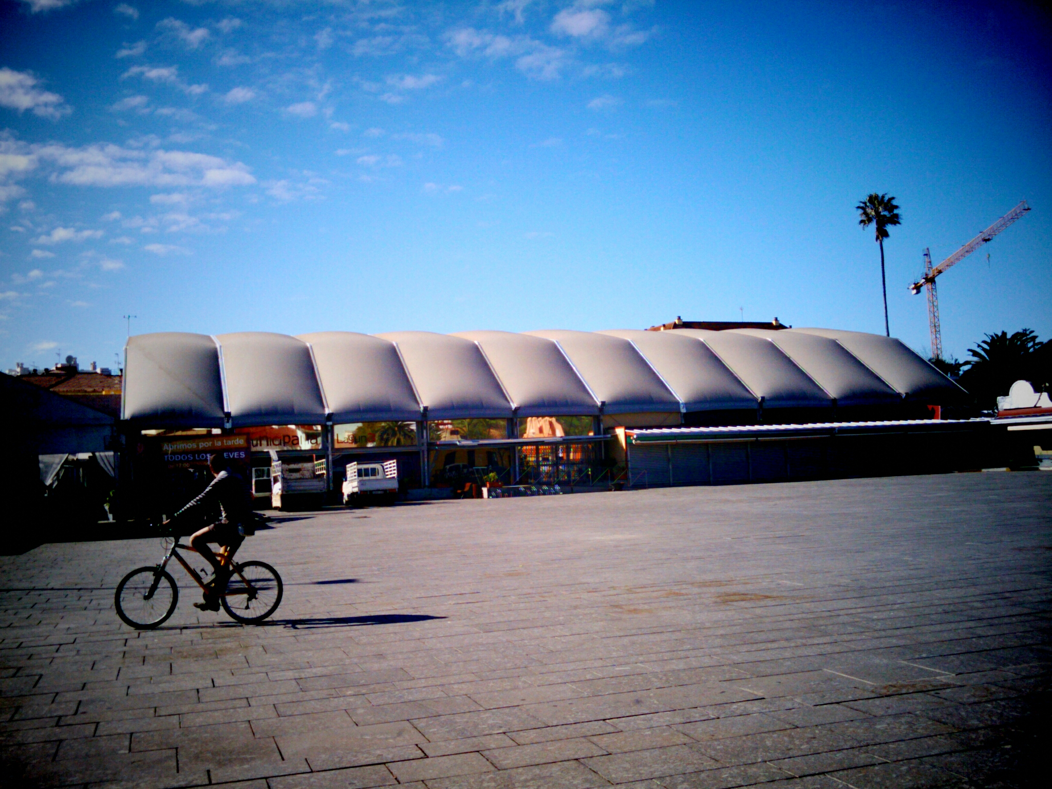 Plaza del Cristo